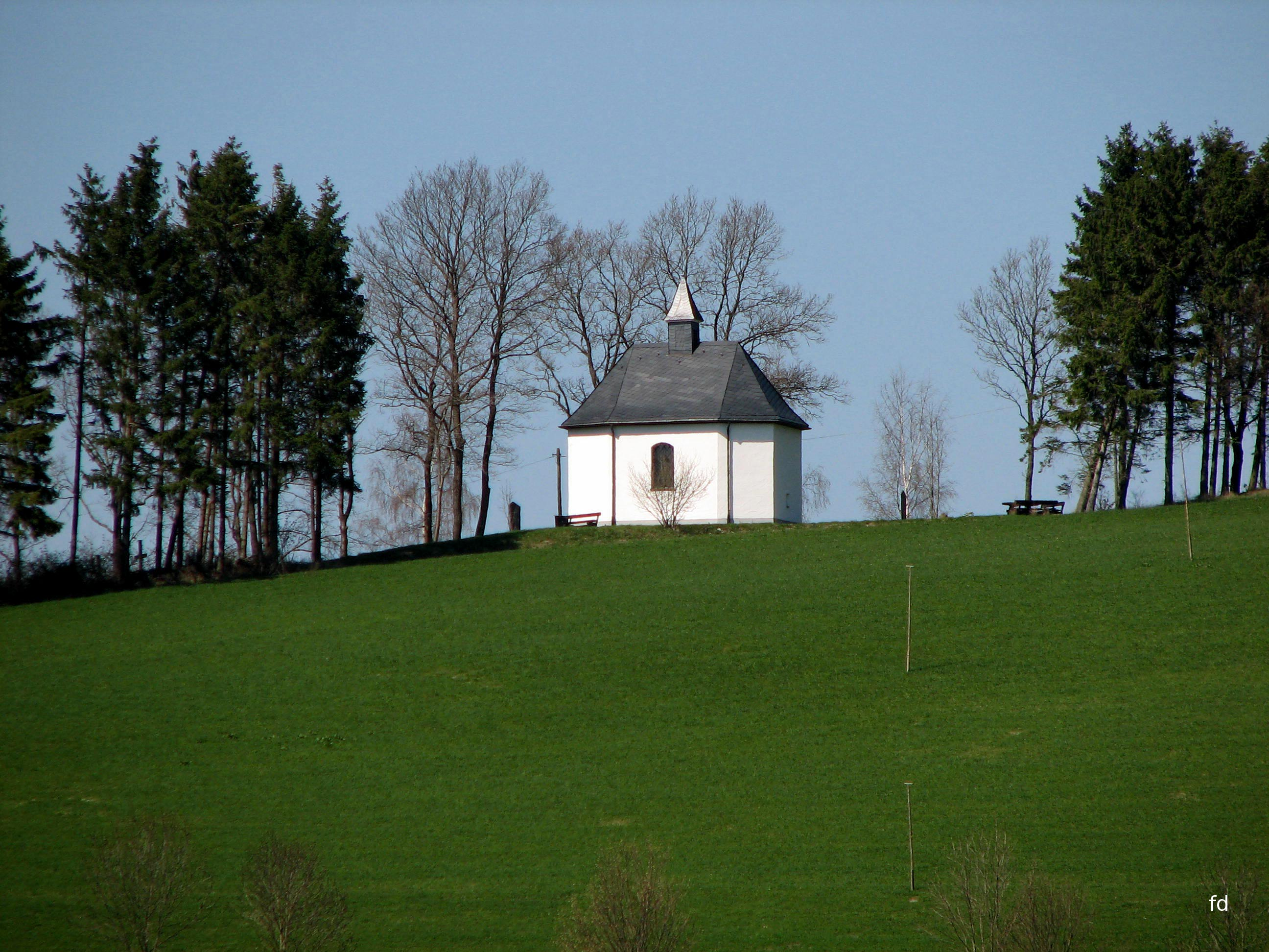 Schmallenberg Kirchrarbach Kreuzbergkapelle Auf dem Steimel